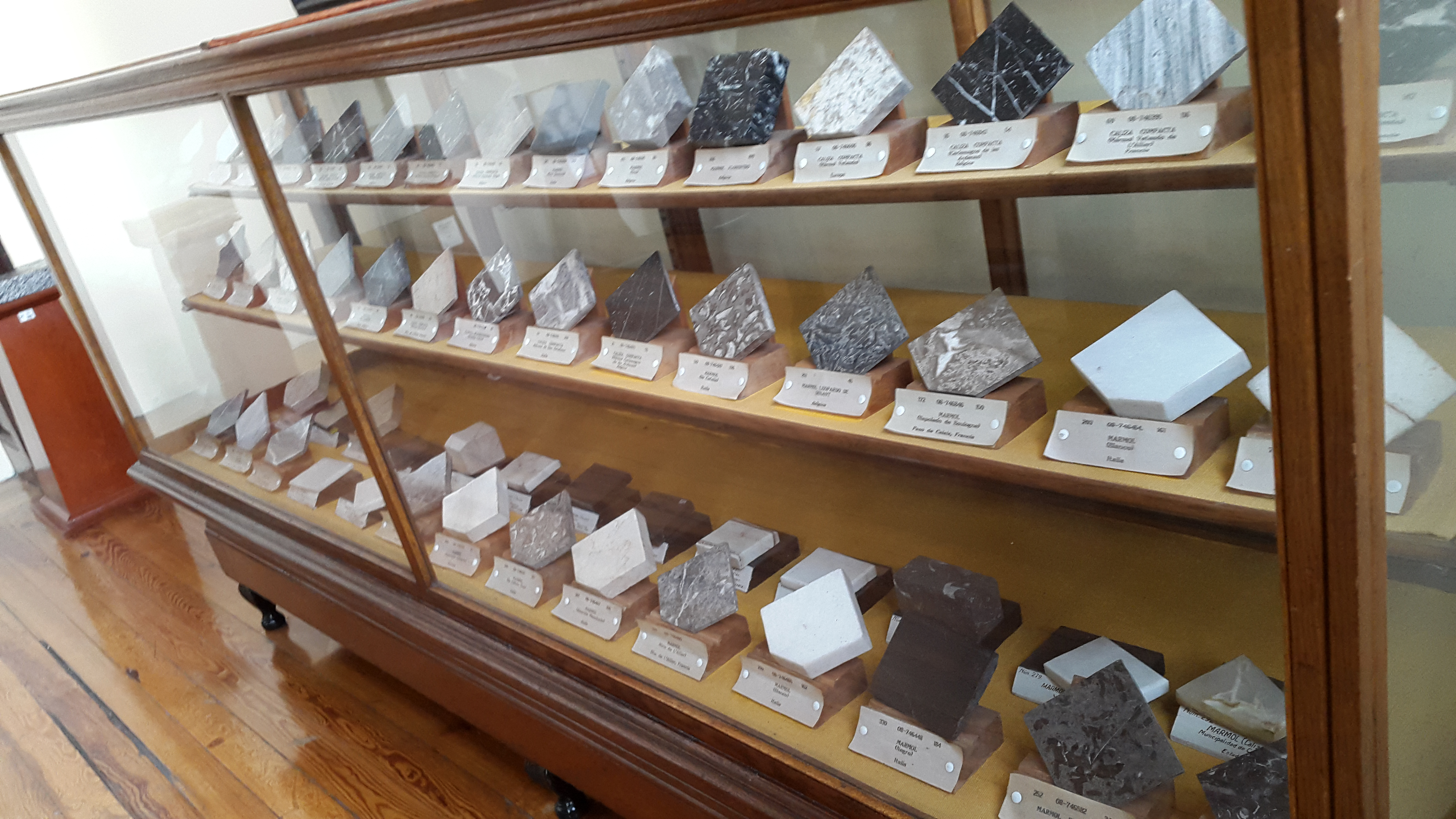 Colección de piedras.